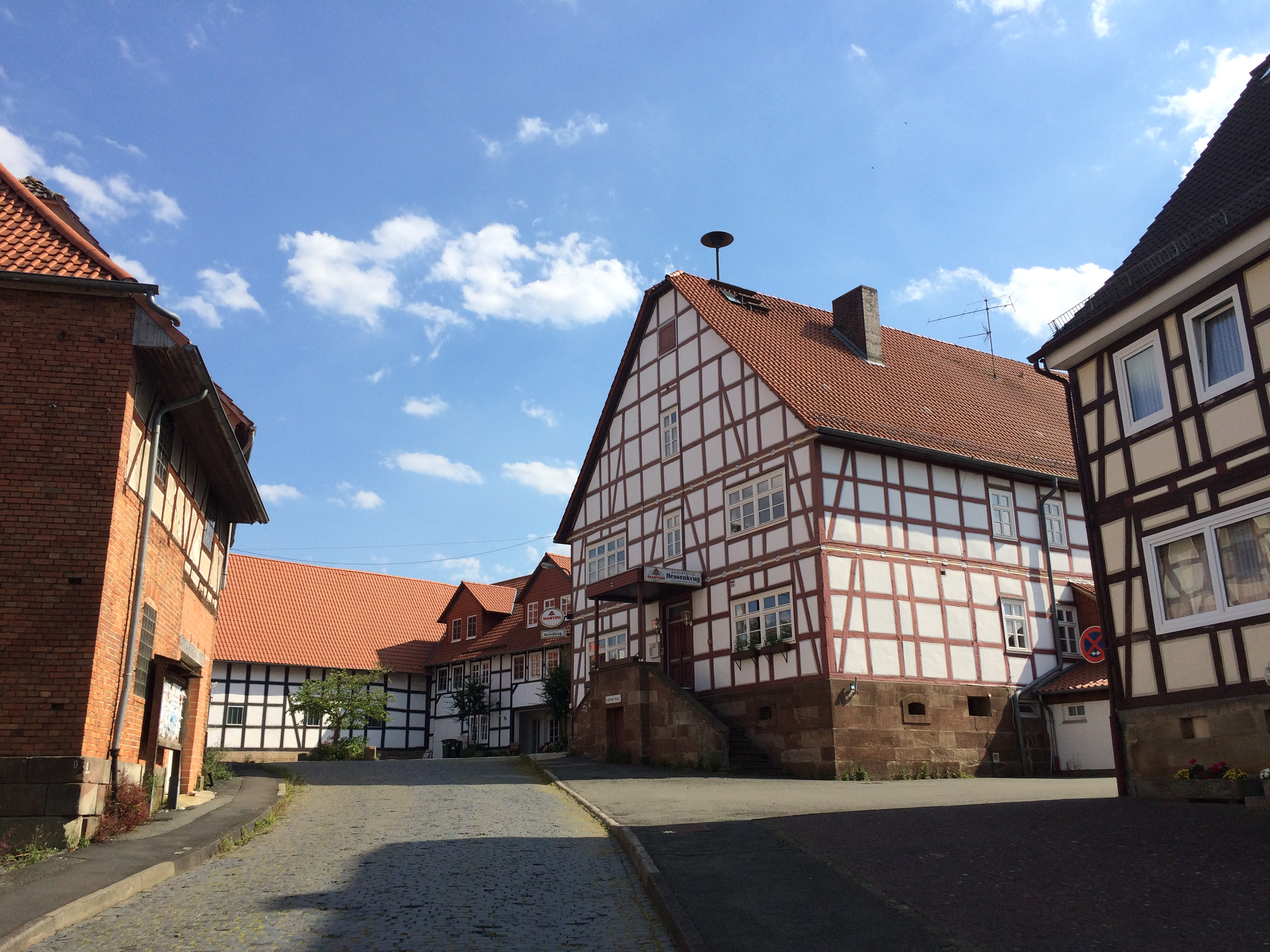 Die Elmarshäuser Straße in Viesebeck, in der Bildmitte die Gaststätte Hessenkrug